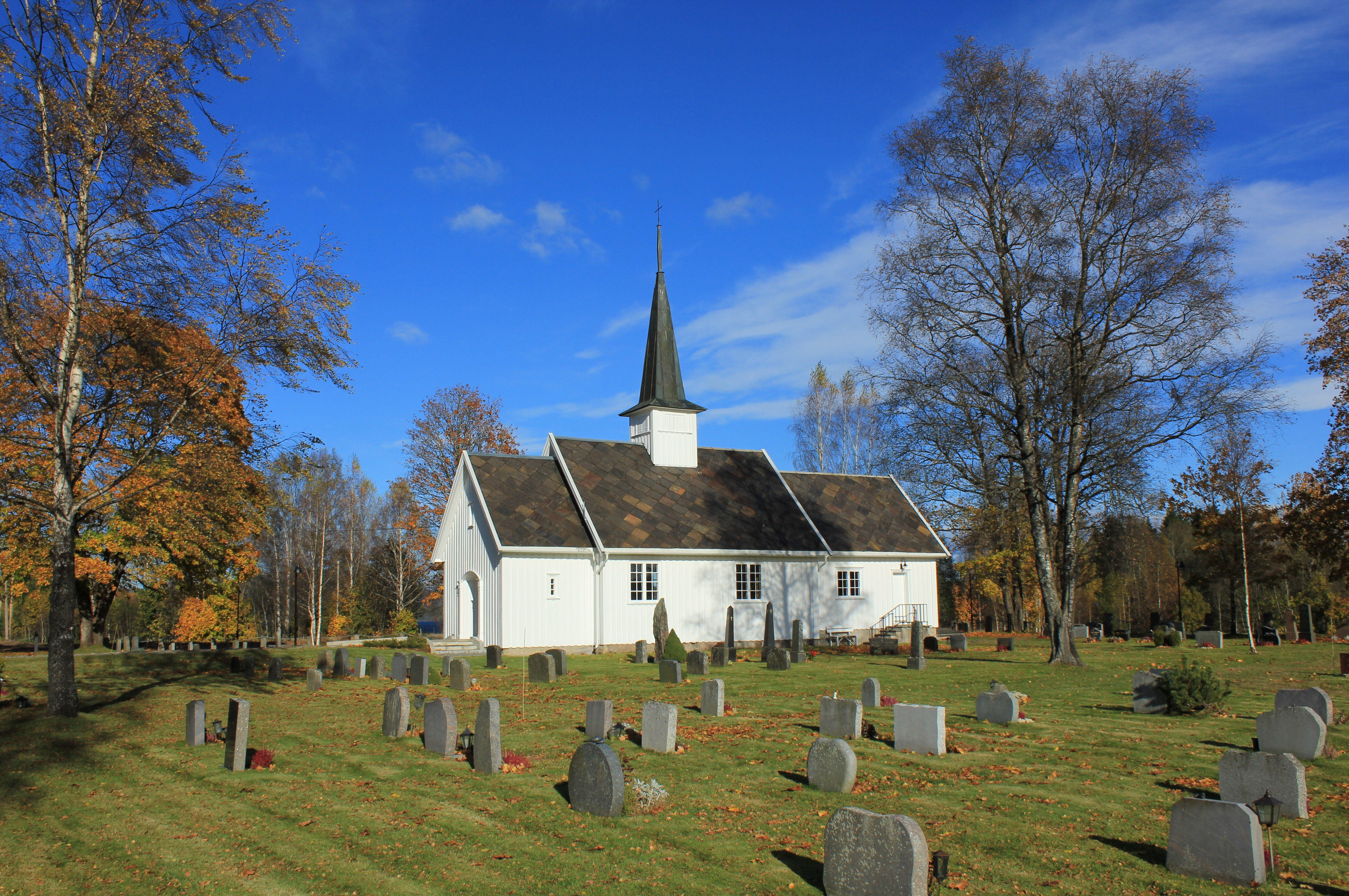 Stensgård kirke i Nannestad en høstdag.